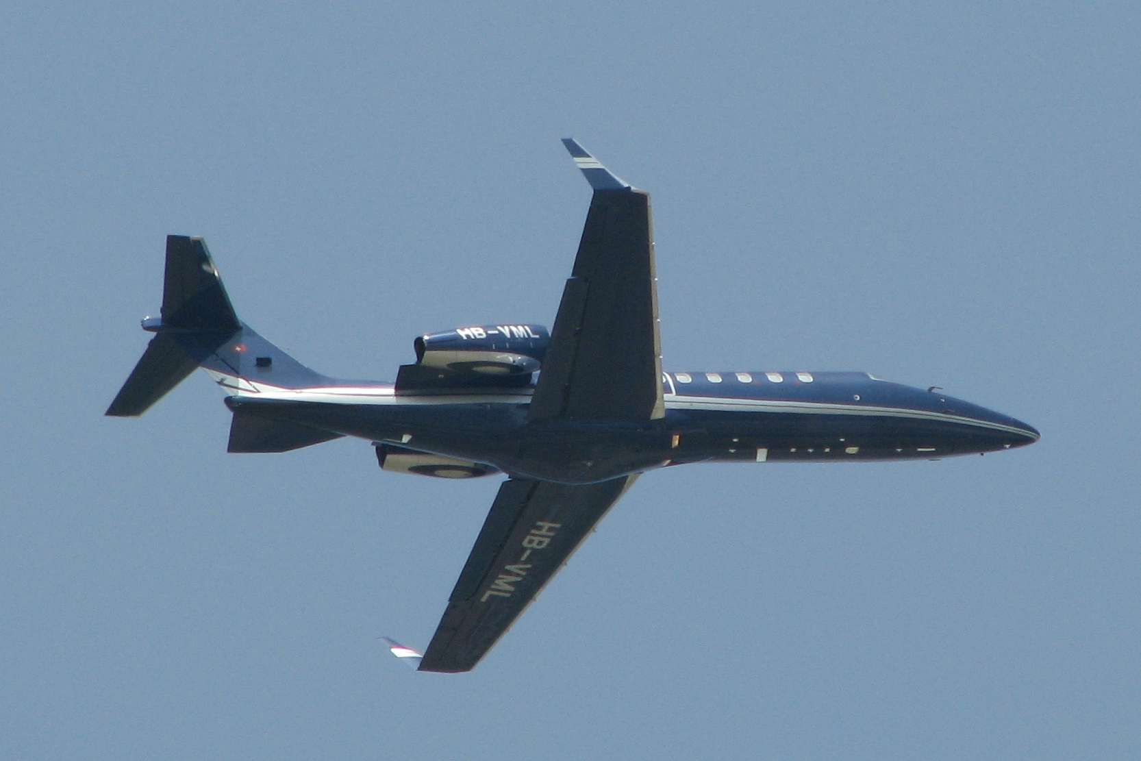 Learjet 45 (Luftfahrzeugkennzeichen: HB-VML), Flugvorführung auf der ILA Berlin 2008